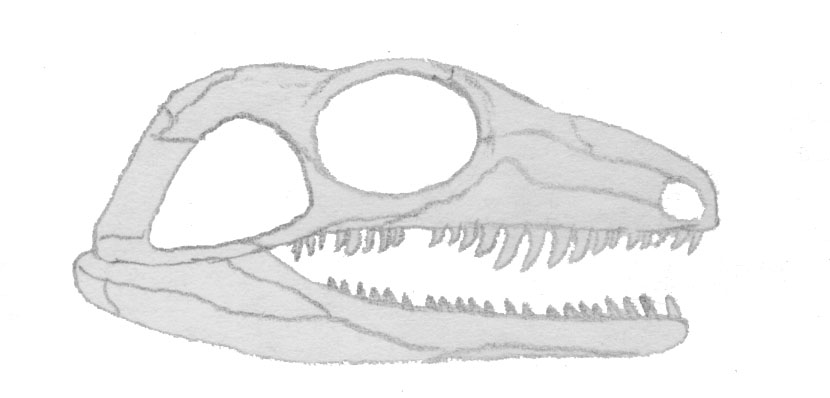 Skull of Aerosaurus, a varanopseid pelycosaur